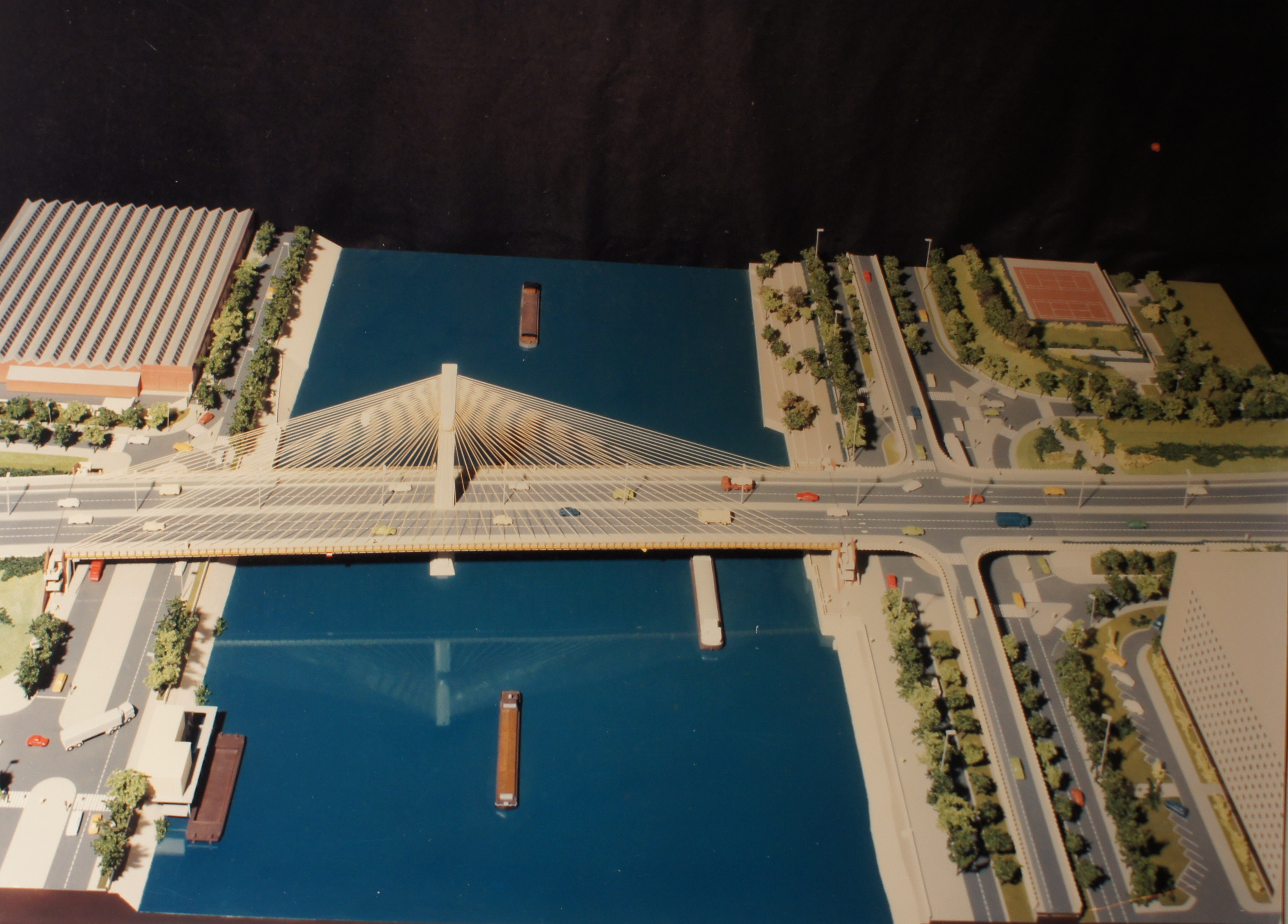 Photos maquette